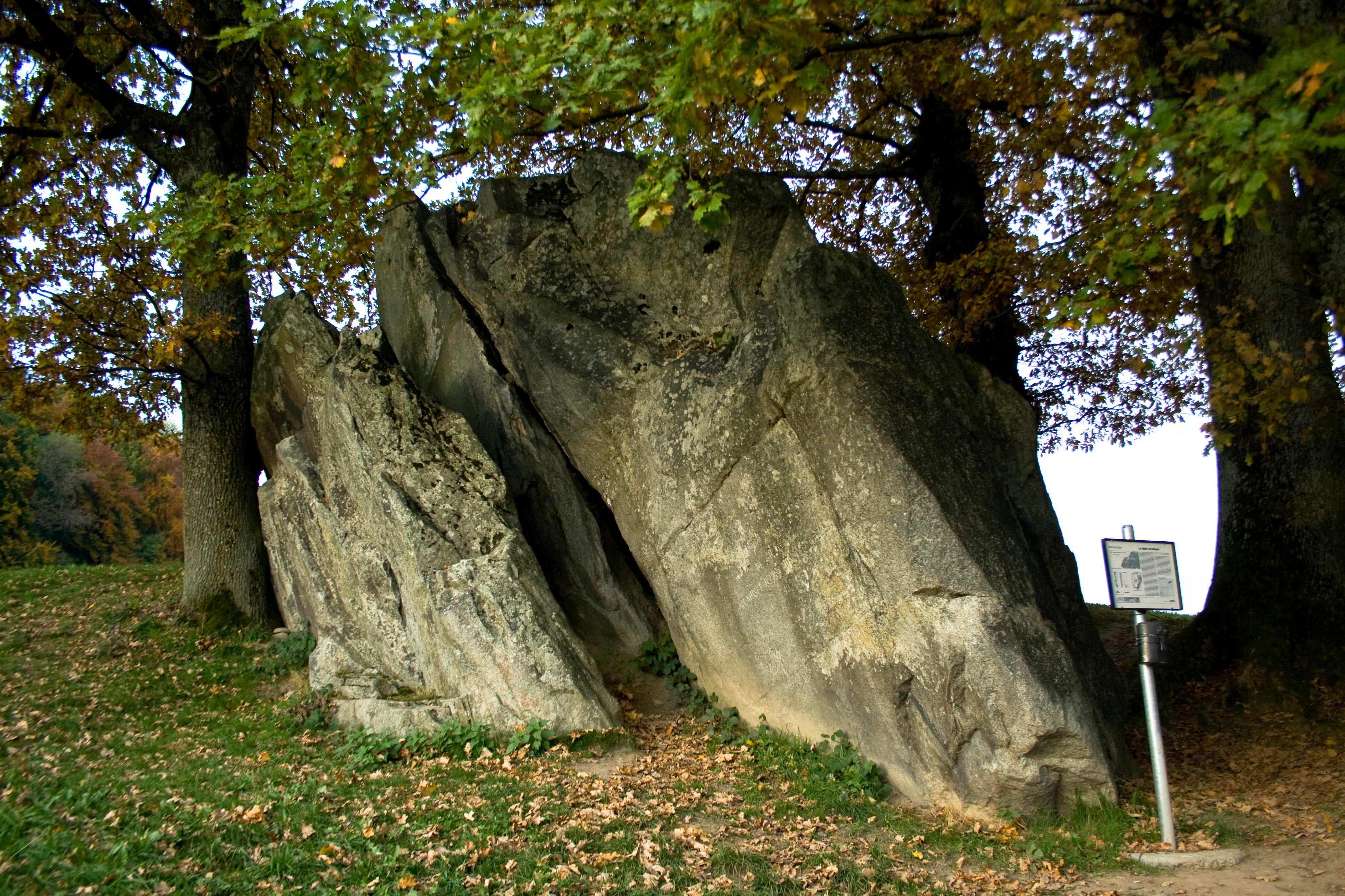 Bloc erratique de la Pierrafortscha dans le canton de Fribourg en Suisse